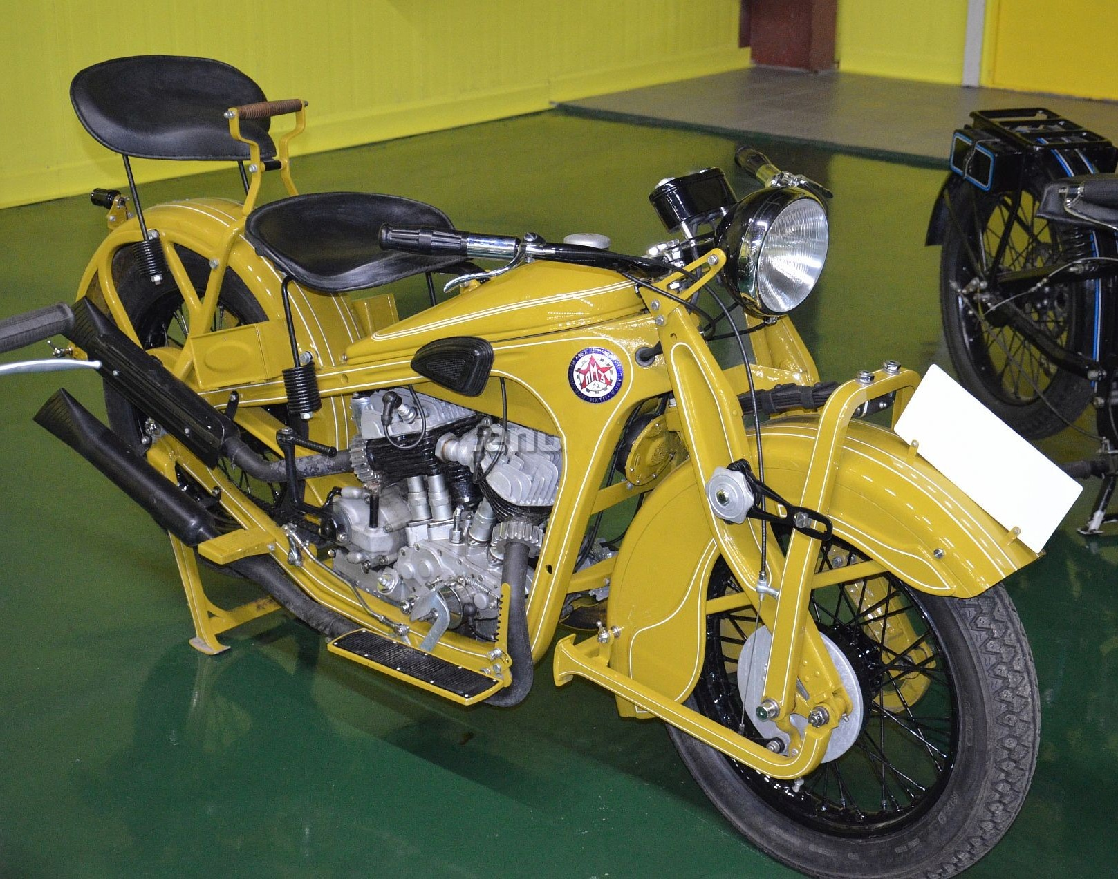 Мотоцикл ПМЗ-А-750. Фото с выставки "Мотомир" Вячеслава Шеянова в Самаре. 2016 год.